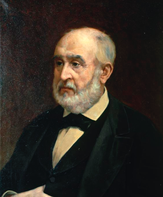 Retrato de Milá y Fontanals